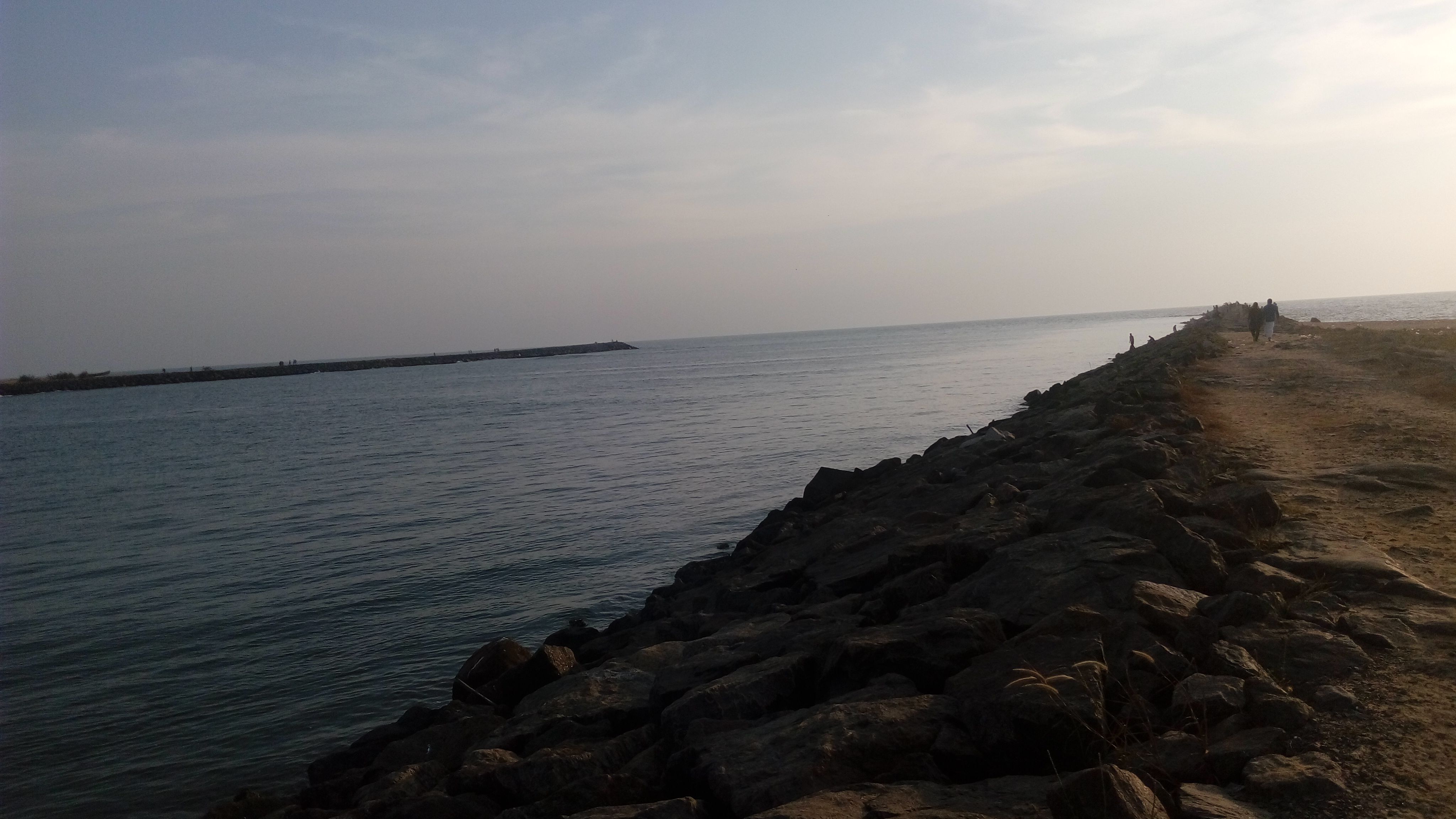 അഴിത്തല അഴിമുഖം